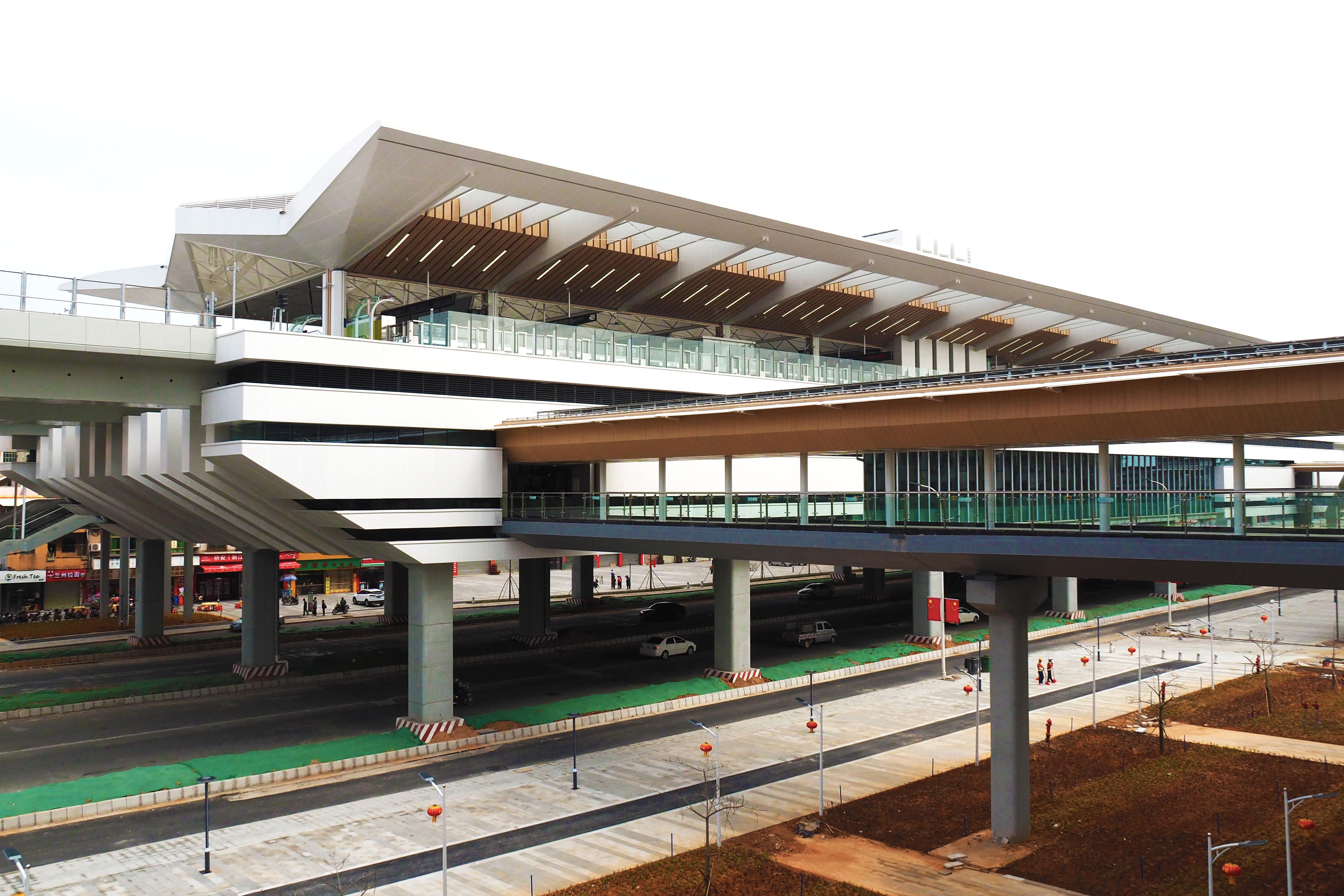 中文（中国大陆）: 广州地铁21号线朱村站